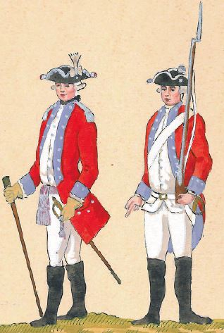 37. Regiment Pieszy Buławy Polnej Koronnej